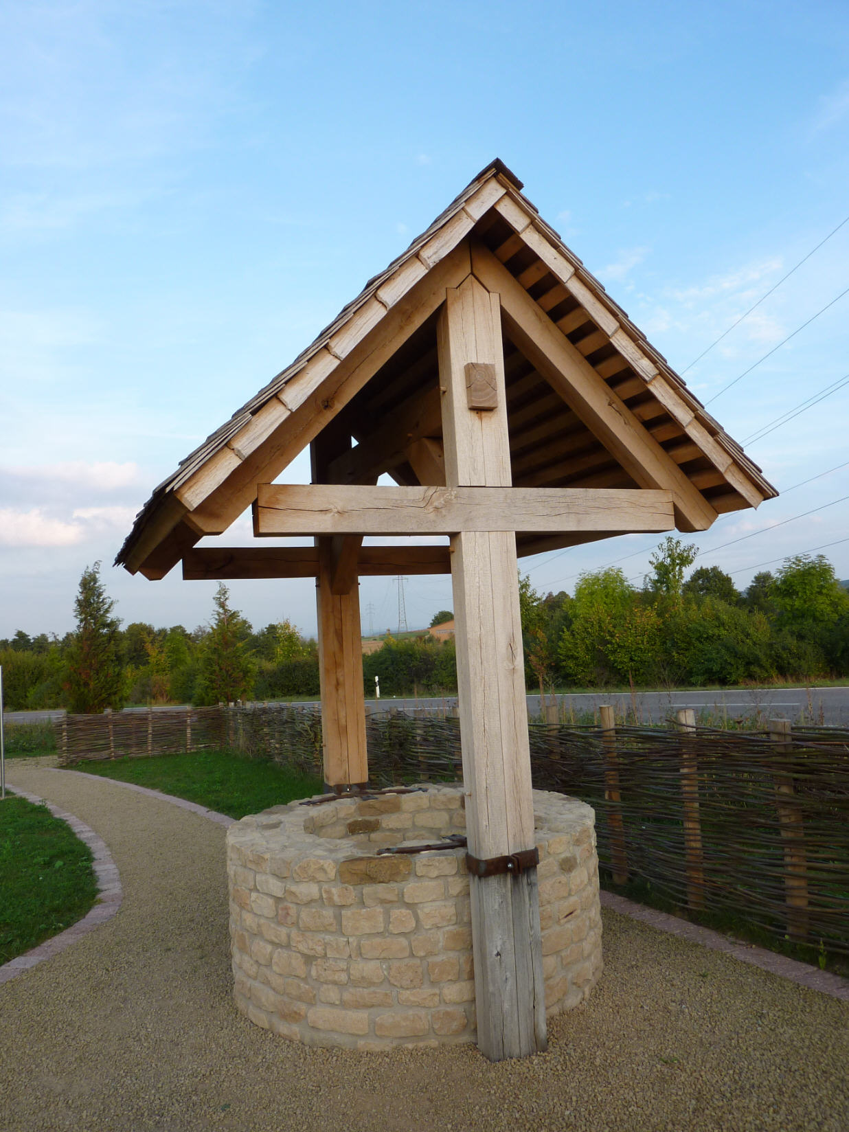 Brunnen im Freilichtmuseum Güglingen